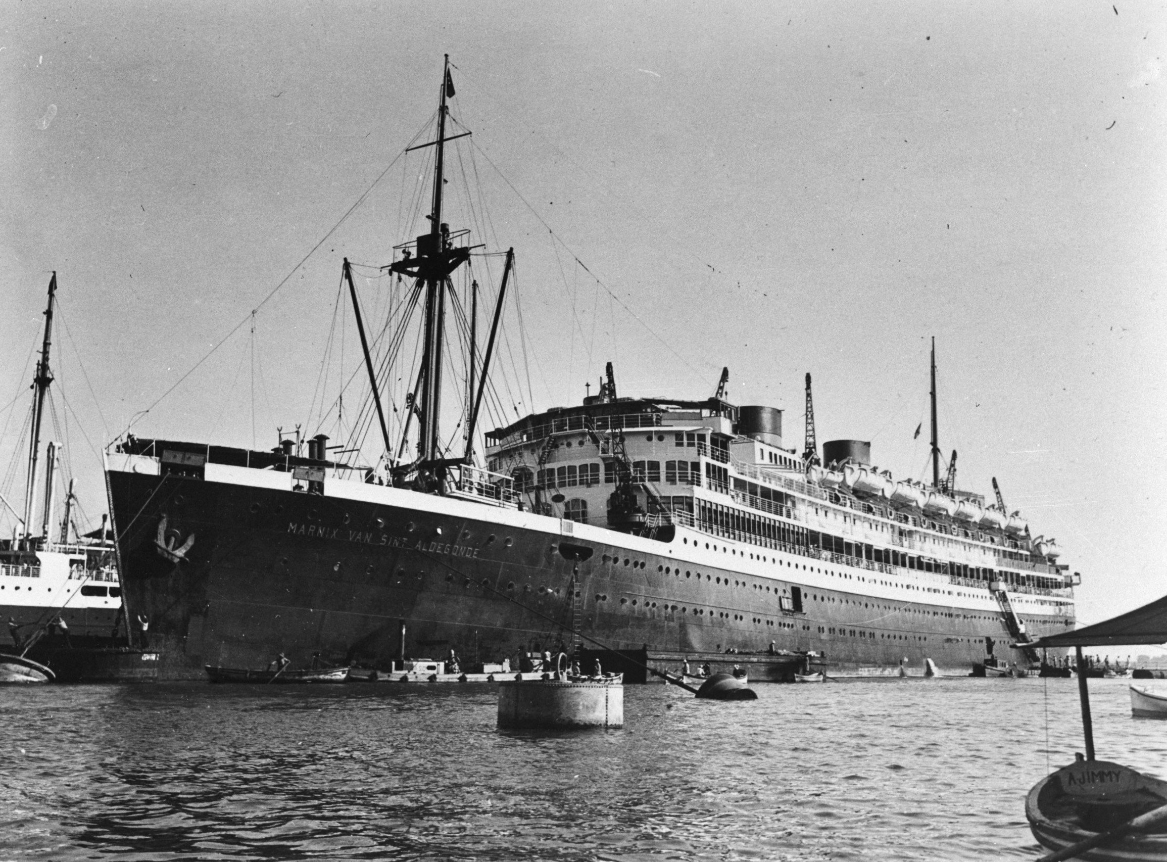 Collectie / Archief : Fotocollectie Anefo Reportage / Serie : MN [Merchant Navy] / Anefo Londen serie Beschrijving : Het passagiersschip m.s. "Marnix van St. Aldegonde" van de Stoomvaart Maatschappij Nederland (SMN) in de haven van Port Said Annotatie : Repronegatief. In de oorlog in gebruik als troepentransportschip. In 1943 door Duitse vliegtuigen tot zinken gebracht voor de kust van Algerije Datum : ongedateerd Locatie : Egypte, Port Saïd Trefwoorden : koopvaardijvloten, marine, schepen, tweede wereldoorlog Fotograaf : Onbekend / Publiek Domein Auteursrechthebbende : Nationaal Archief Materiaalsoort : Negatief (zwart/wit) Nummer archiefinventaris : bekijk toegang 2.24.01.04 Bestanddeelnummer : 935-3119